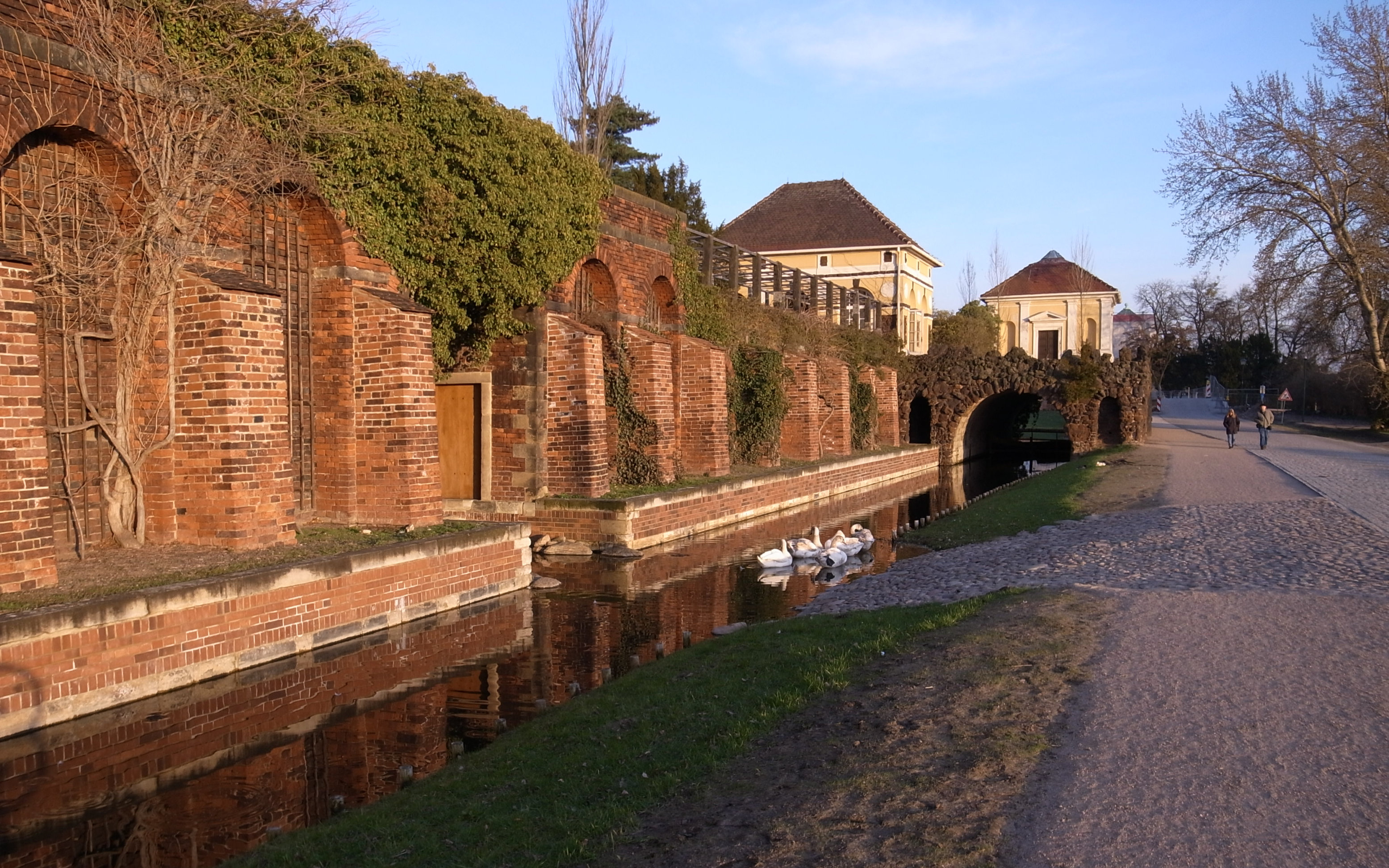 Wörlitz, Eisenhart